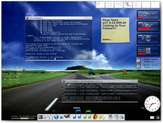 Elive Desktop